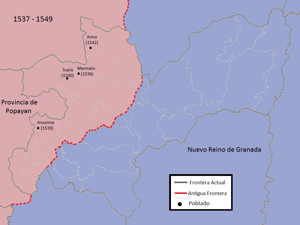 mapa de caldas